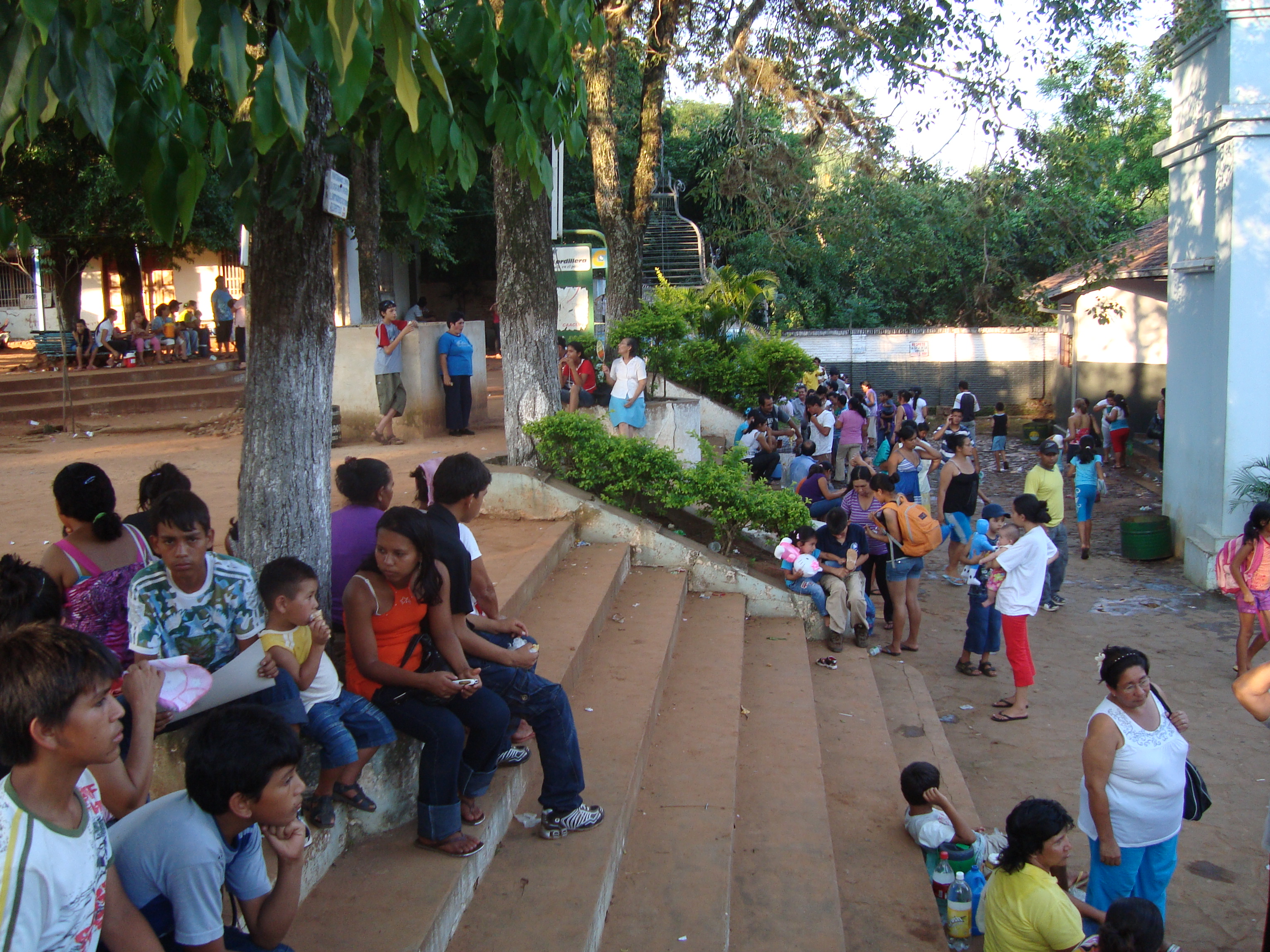 El Tupasy Ykua (manantial de la Virgen) es uno de los principales puntos del peregrinaje de la Virgen de los Milagros de Caacupé (Paraguay), que reune a miles de peregrinos el 8 de diciembre de cada año.